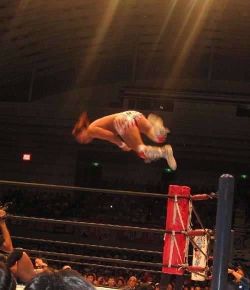 2014年6月21日 大阪府立体育会館 「DOMINION6.21」 スターダストプレスを放つ内藤哲也